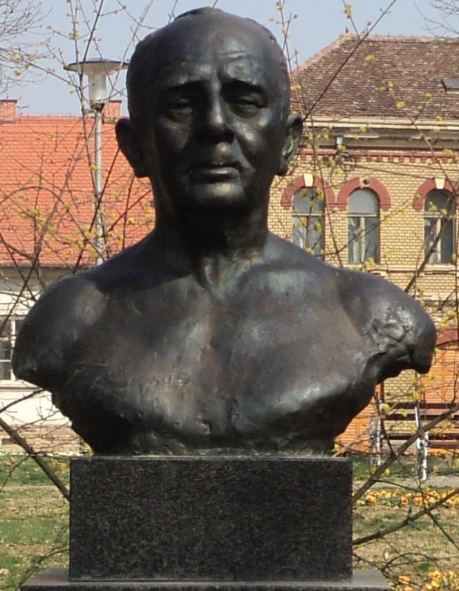 Skuptura slikara Vladimira Filakovca u Slavonskom Brodu kod Franjevačkog samostana